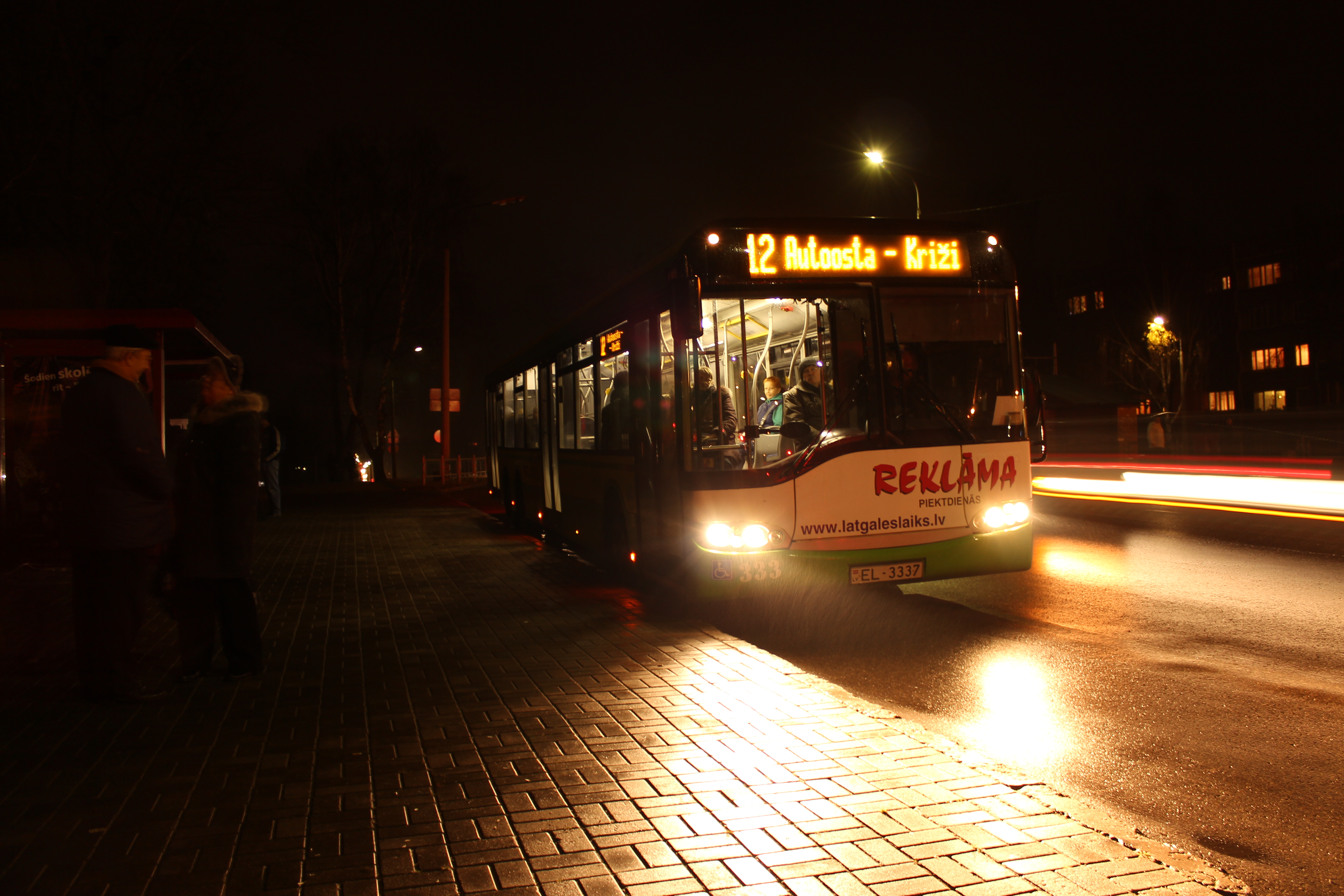 Dauagavpils 12. maršruta autobuss pieturā "Jaunbūve"